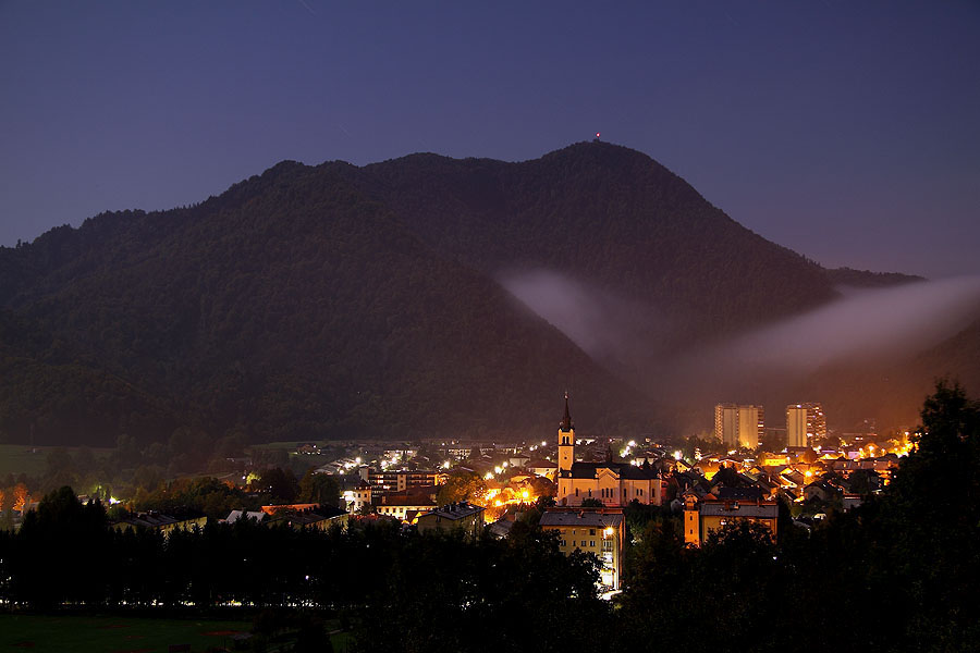 Nočna slika mesta Škofja Loka s predelom Stare loke in v ozadju naselje Podlubnik. V ozadju se vzpenja Lubnik z nadmosko višino 1025m.